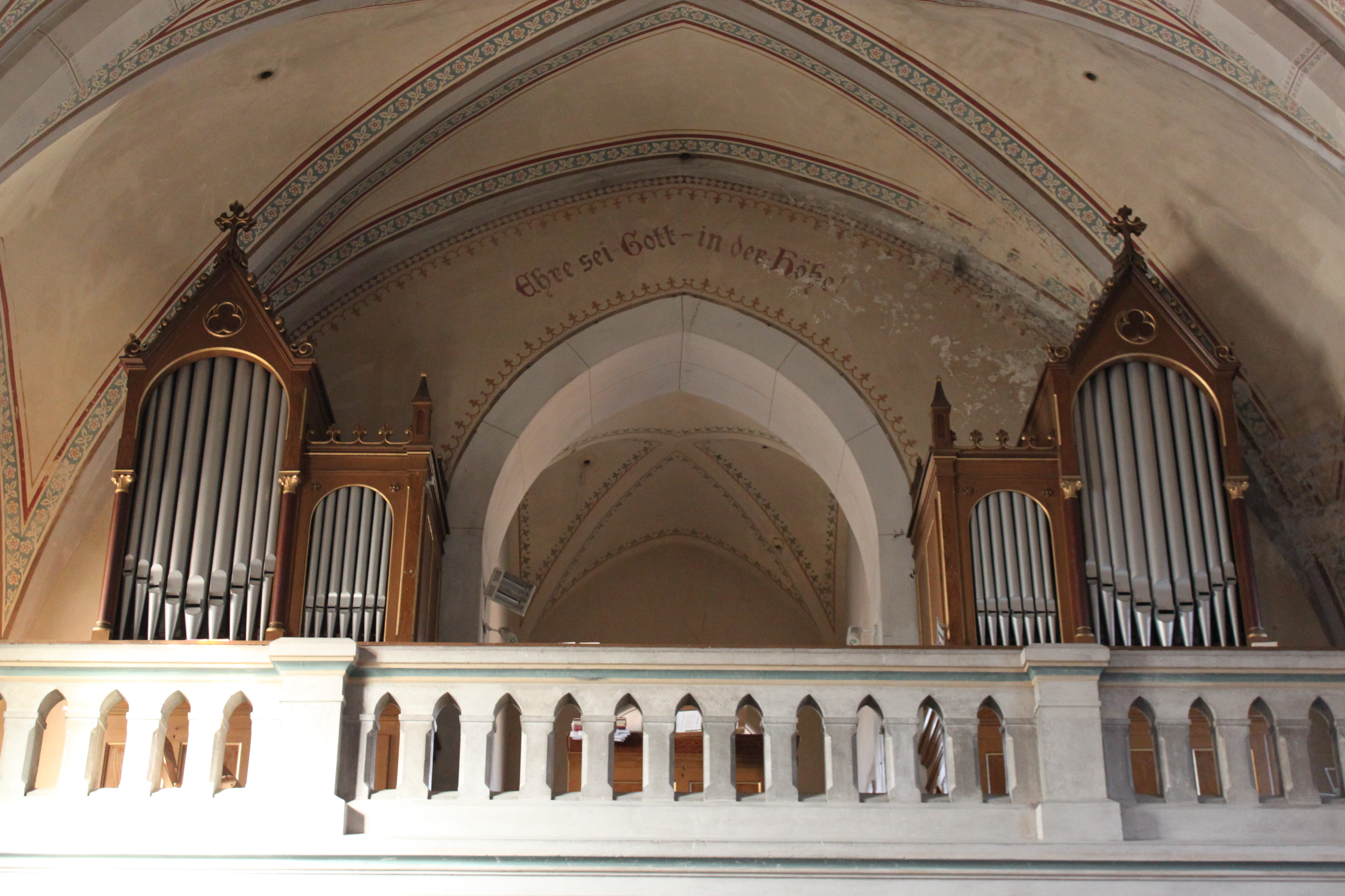 Orgel der Pfarr- und Wallfahrtskirche Maria Gugging, errichtet 1895 von Johann M. Kauffmann und 1913 aus der Pfarrkirche St. Antonius von Padua in Wien XV. nach Gugging übertragen